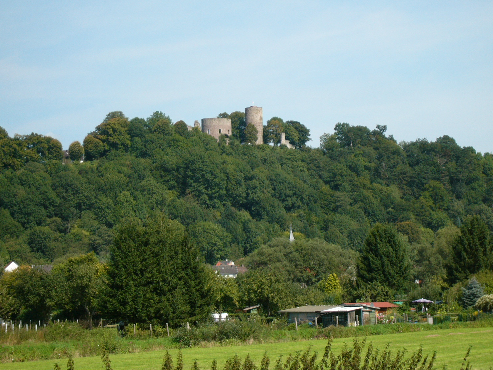 Krukenburg bei Helmarshausen in Nordhessen Krukenburg near Helmarshausen in northern Hesse.